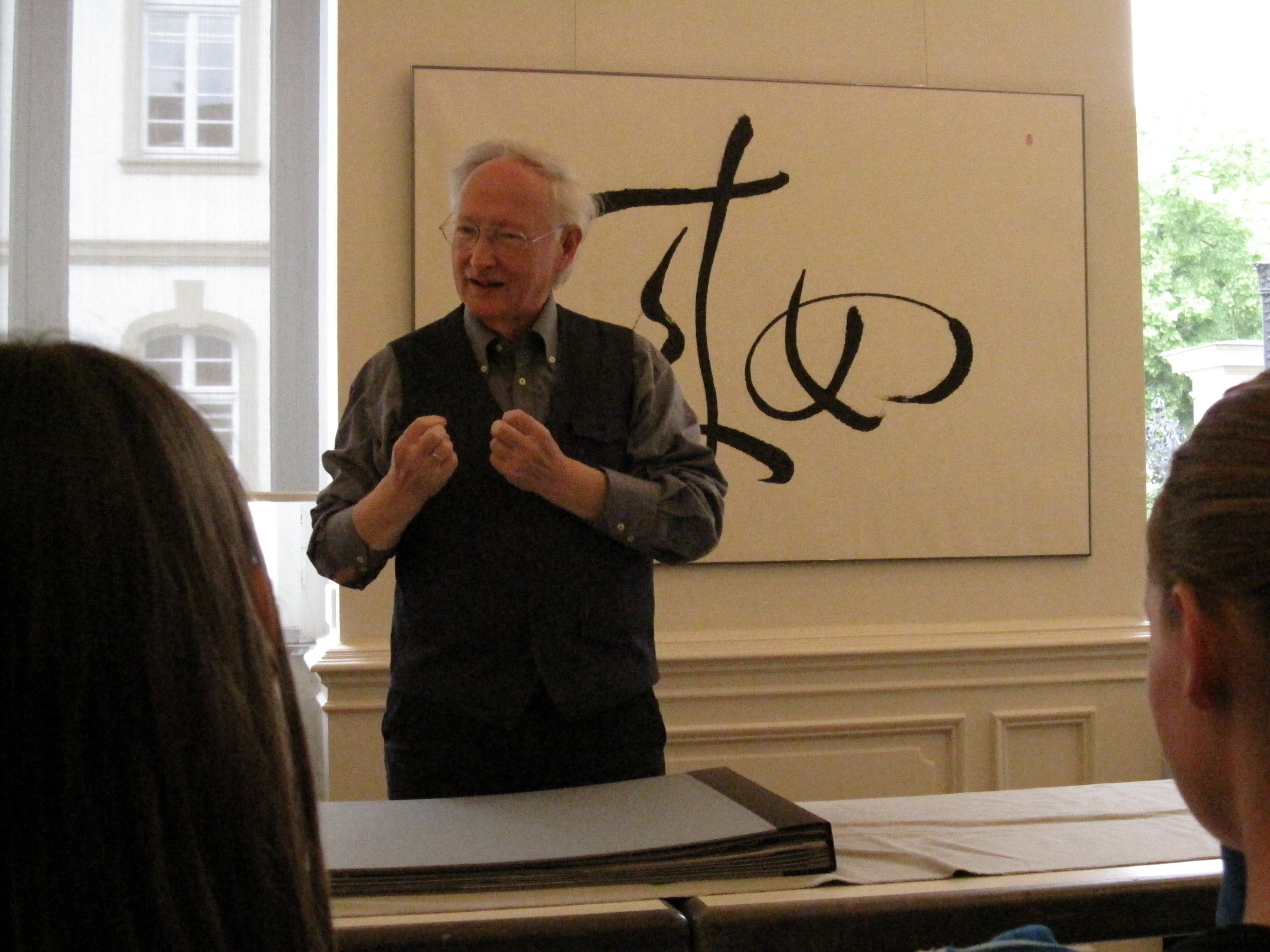 Gottfried Pott bei einer Veranstaltung im Klingspormuseum in Offenbach am Main